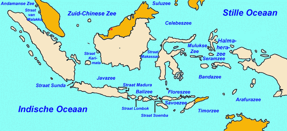 Eigen werk